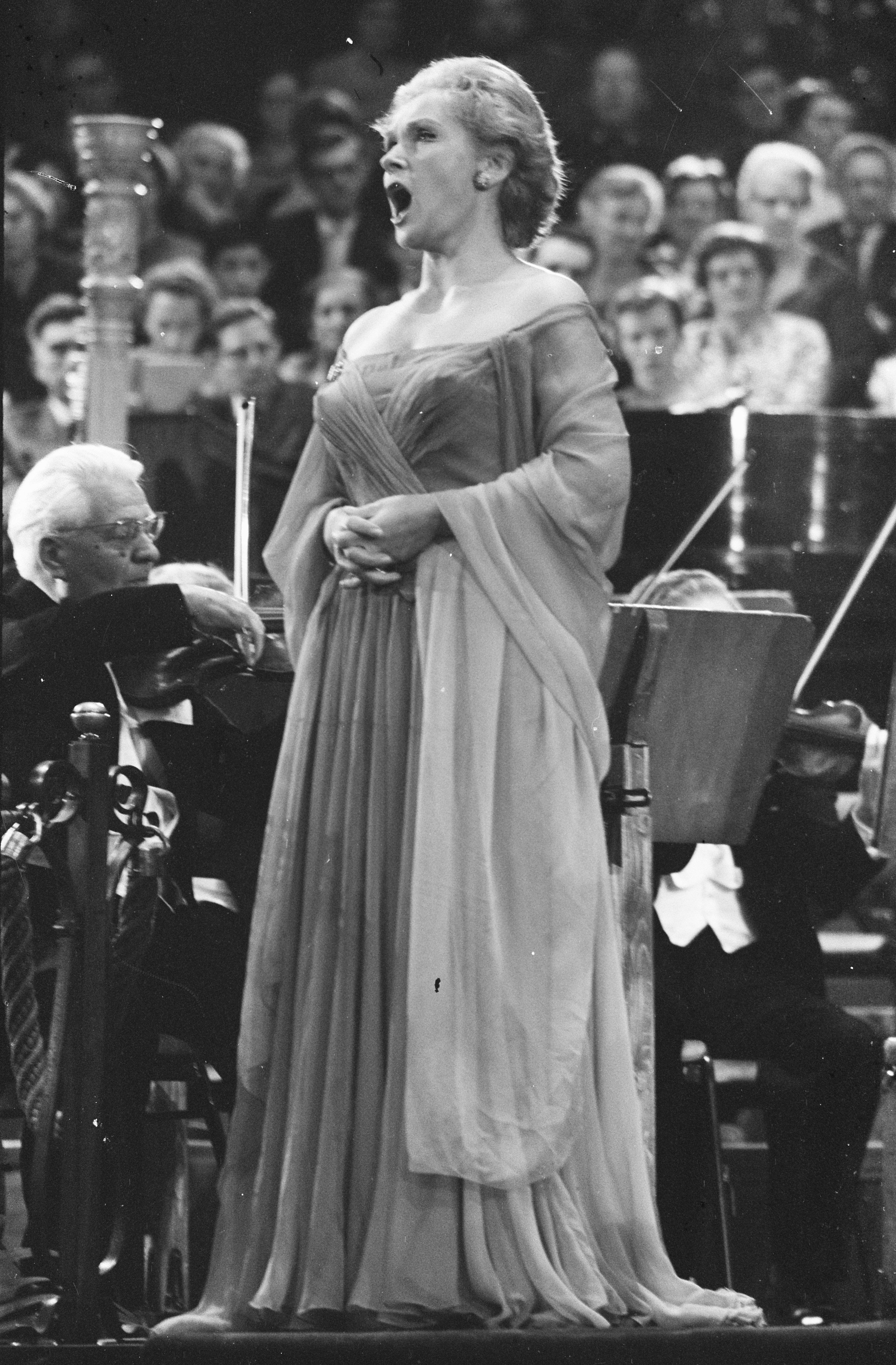 Collectie / Archief : Fotocollectie Anefo Reportage / Serie : [ onbekend ] Beschrijving : Uitreiking Edisons in Grand Gala Du Disque Datum : 29 september 1961 Trefwoorden : Uitreikingen Fotograaf : Pot, Harry / Anefo Auteursrechthebbende : Nationaal Archief Materiaalsoort : Negatief (zwart/wit) Nummer archiefinventaris : bekijk toegang 2.24.01.05 Bestanddeelnummer : 912-9837